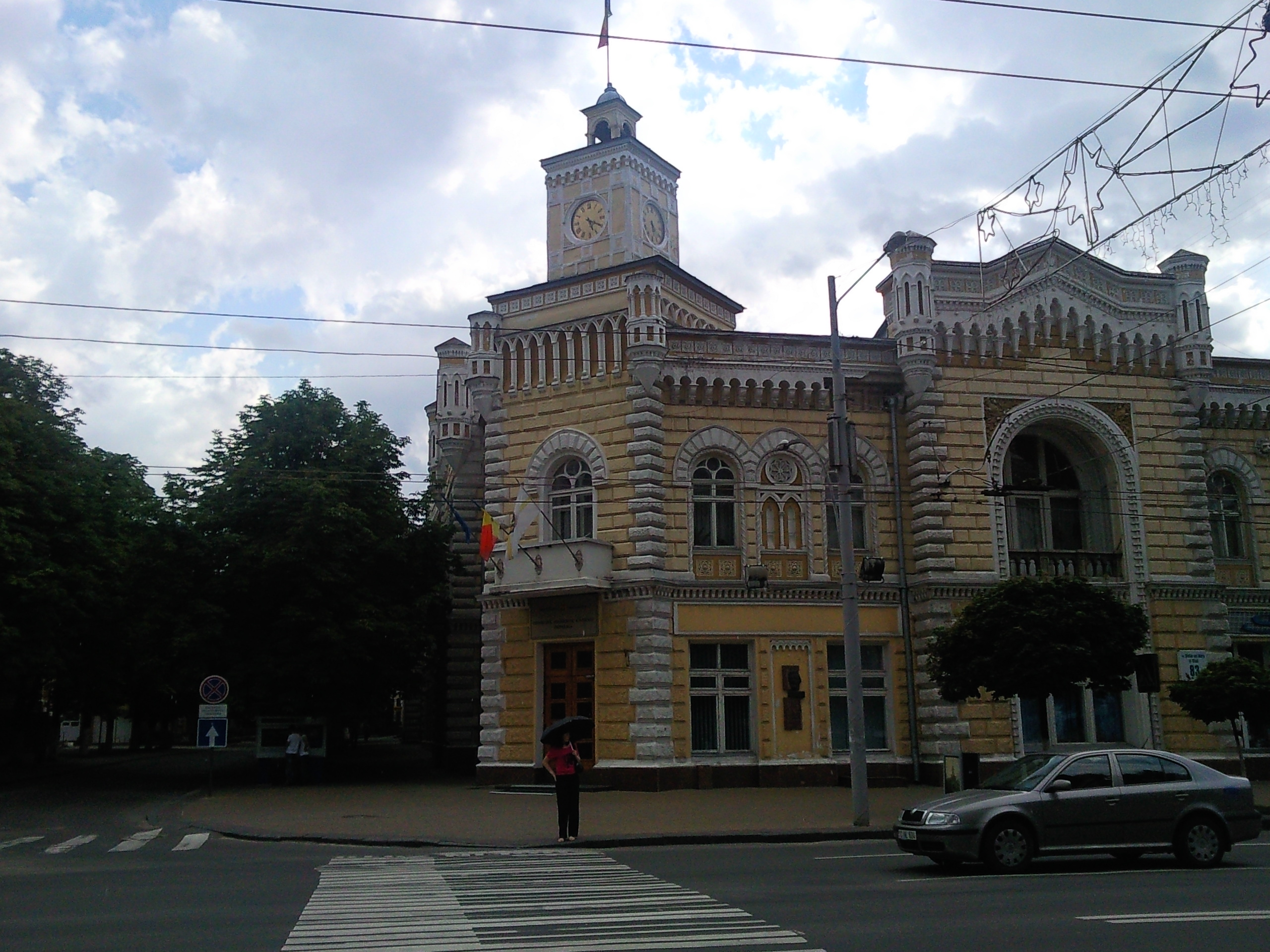 Мэрия Кишинева